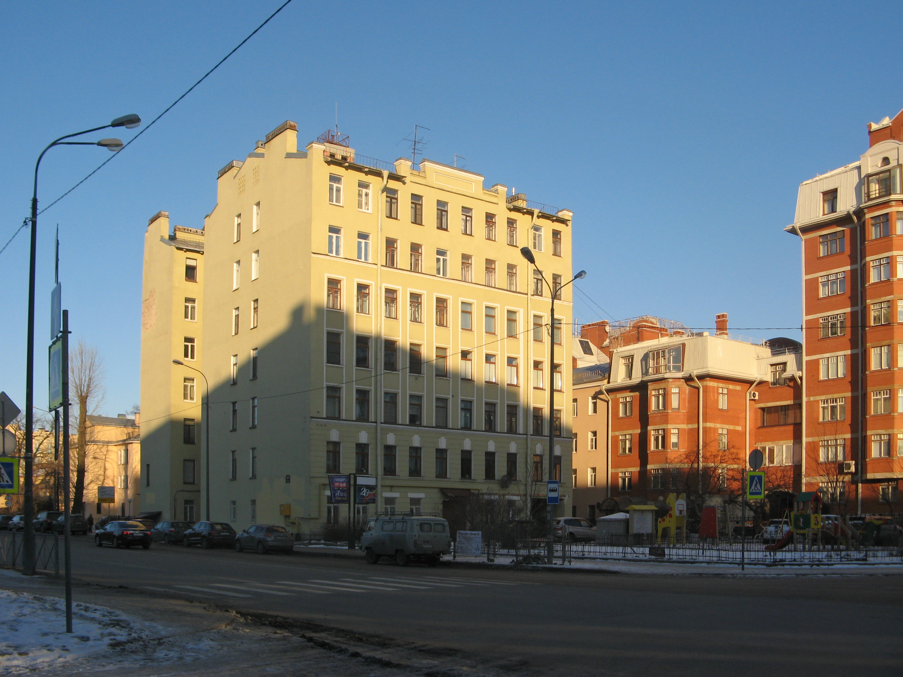 Дома на углу Вязовой и Спортивной улиц, Санкт-Петербург